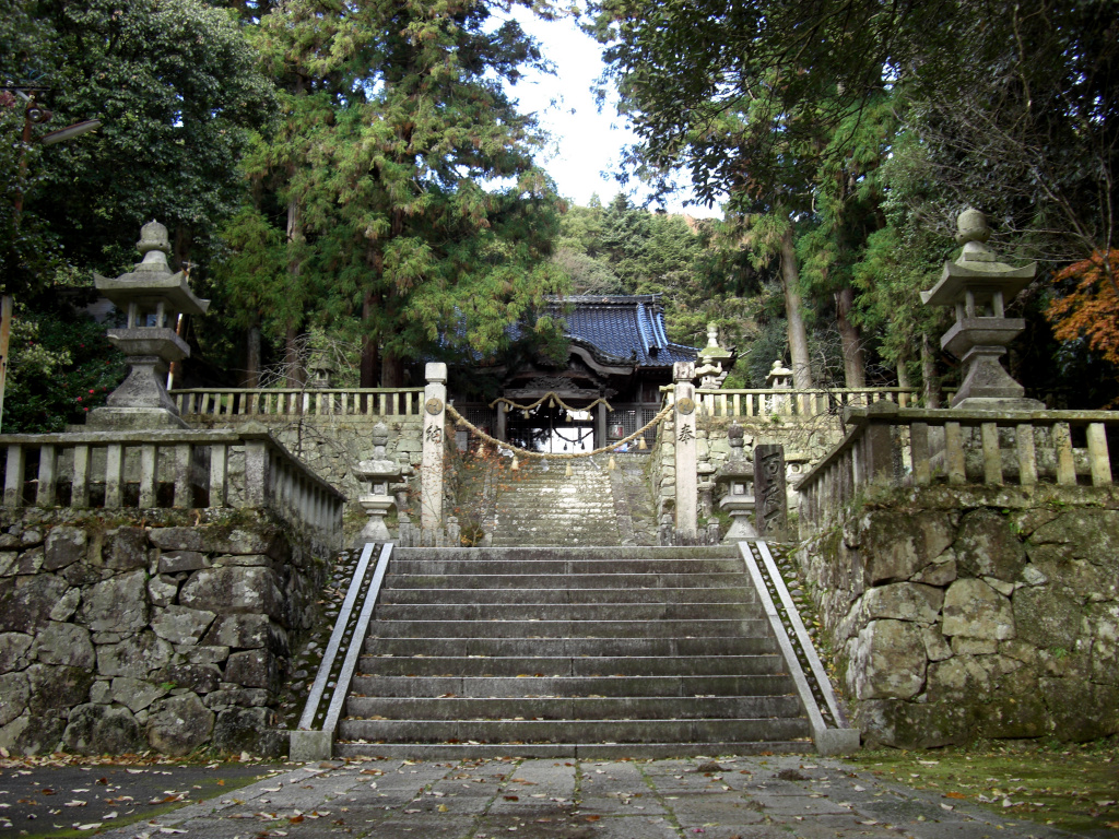 兵庫県姫路市林田町八幡 林田八幡神社